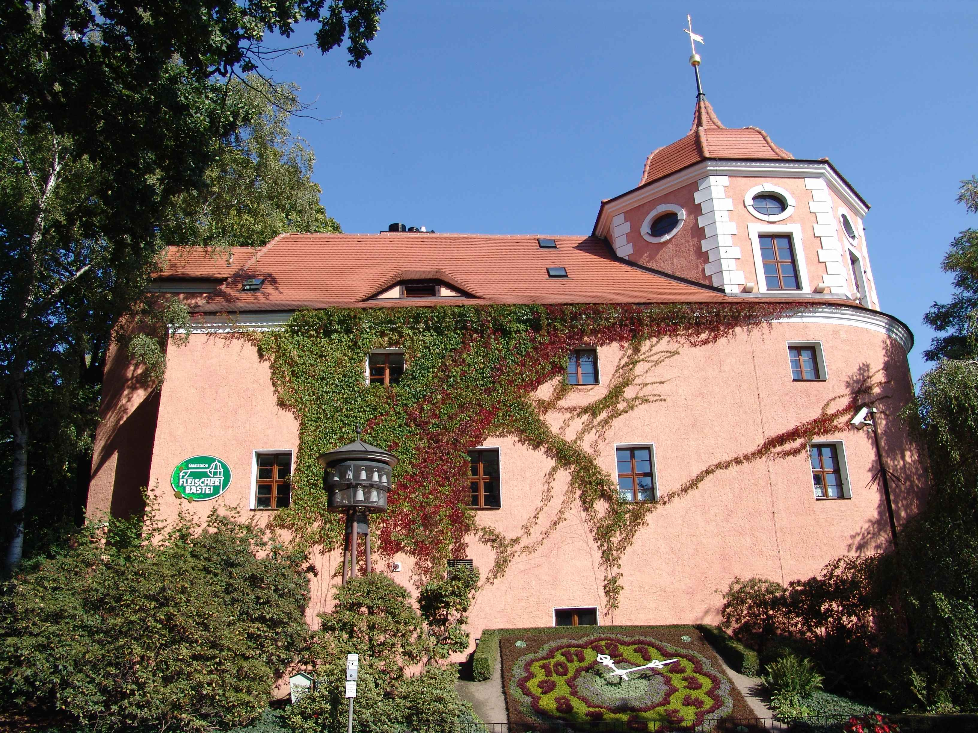 Fleischerbastei Zittau mit der Blumenuhr und dem Porzellanglockenspiel